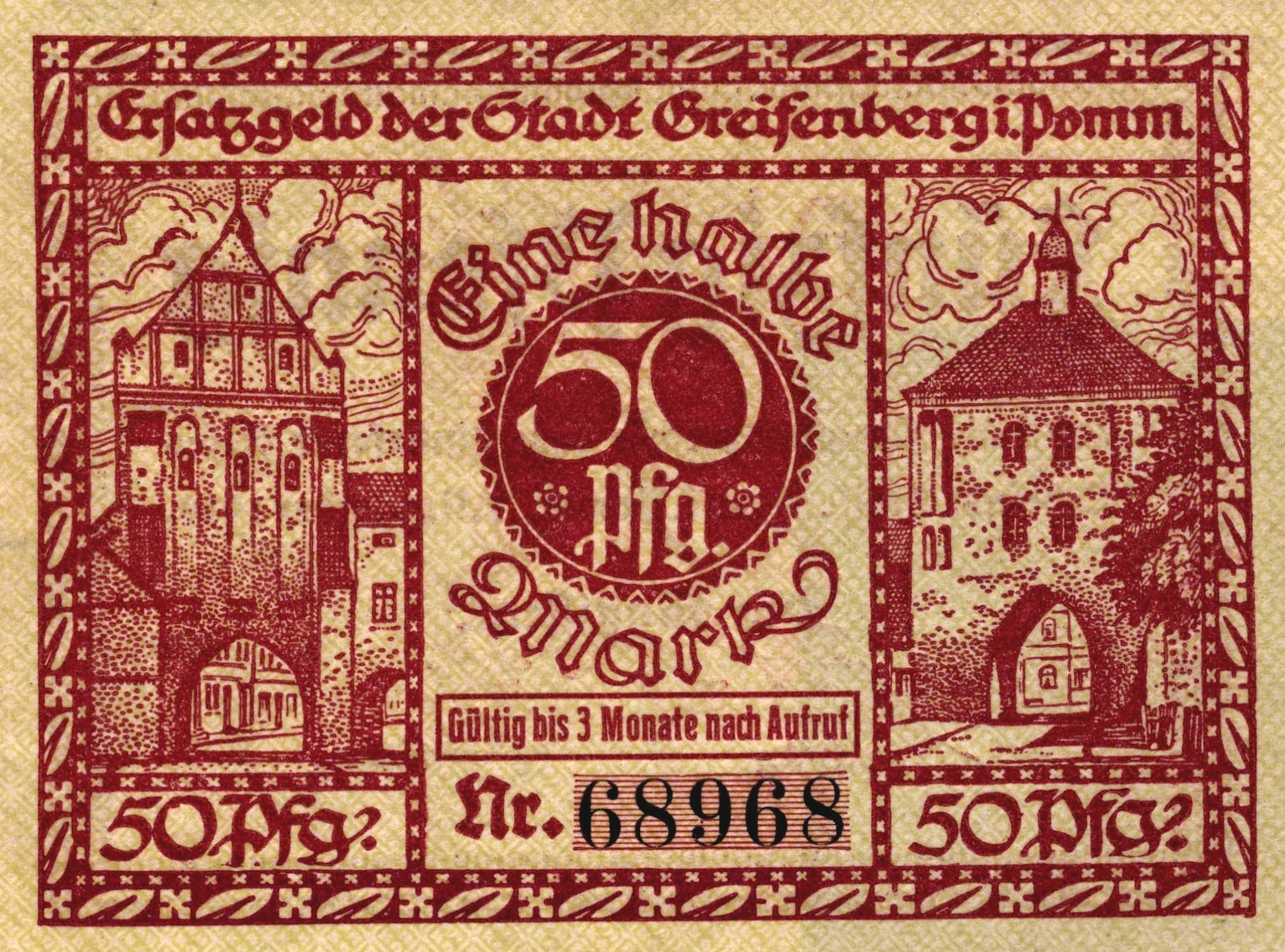 Notgeld miasta Gryfice (wtedy Greifenberg) w latach 07.11.1919 - 07.02.1920